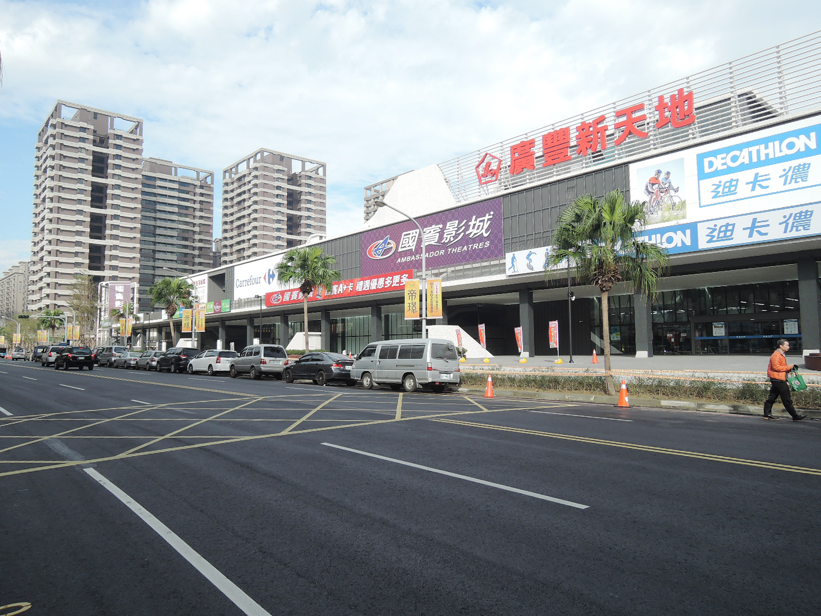 中文（台灣）: 桃園市八德區廣豐新天地